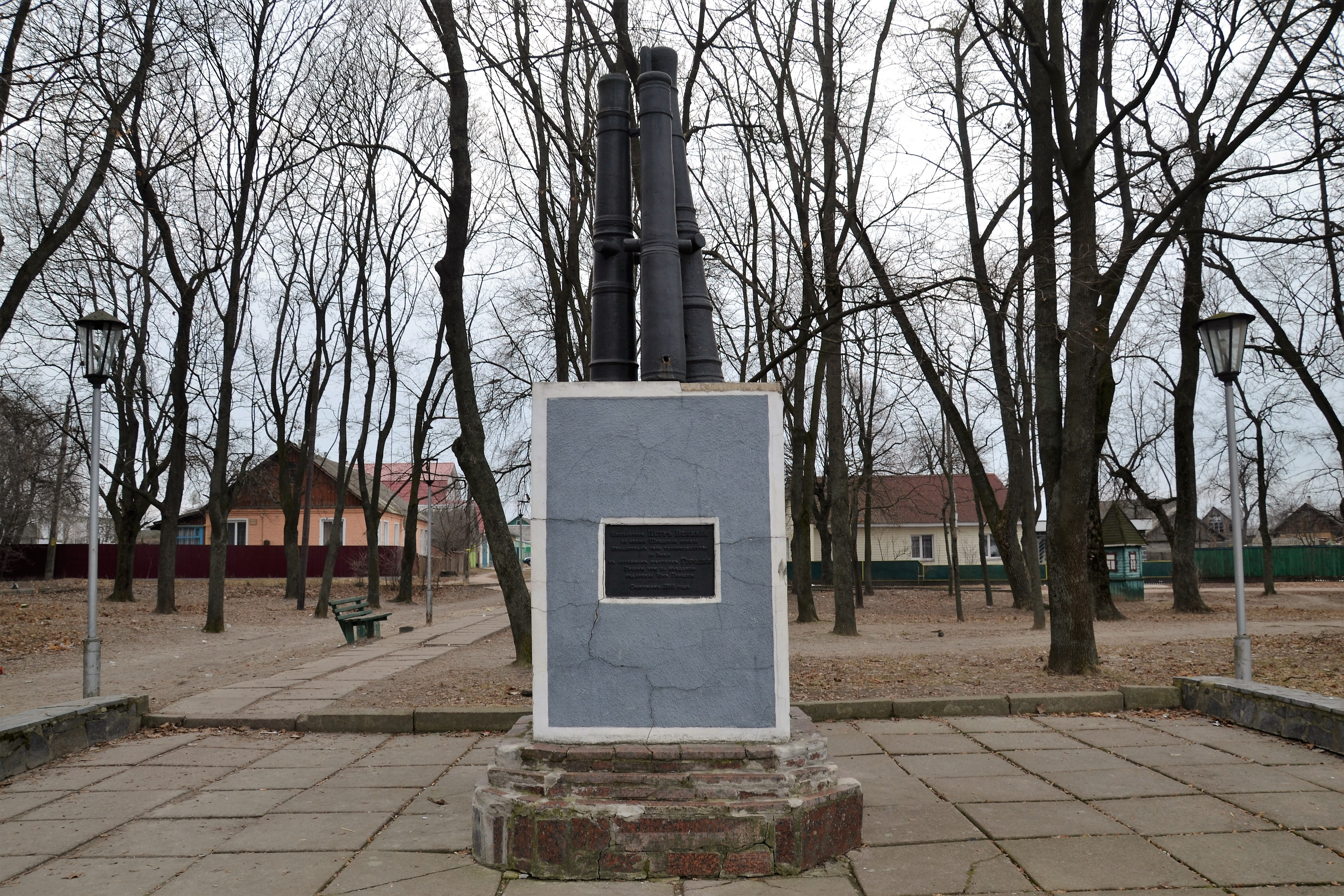 Пам’ятний знак - гармати першої чверті XVII ст., подаровані Петром I жителям Городні за героїзм, виявлений в боротьбі зі шведськими інтервентами, Городня, вул. Червоноармій- ська, сквер